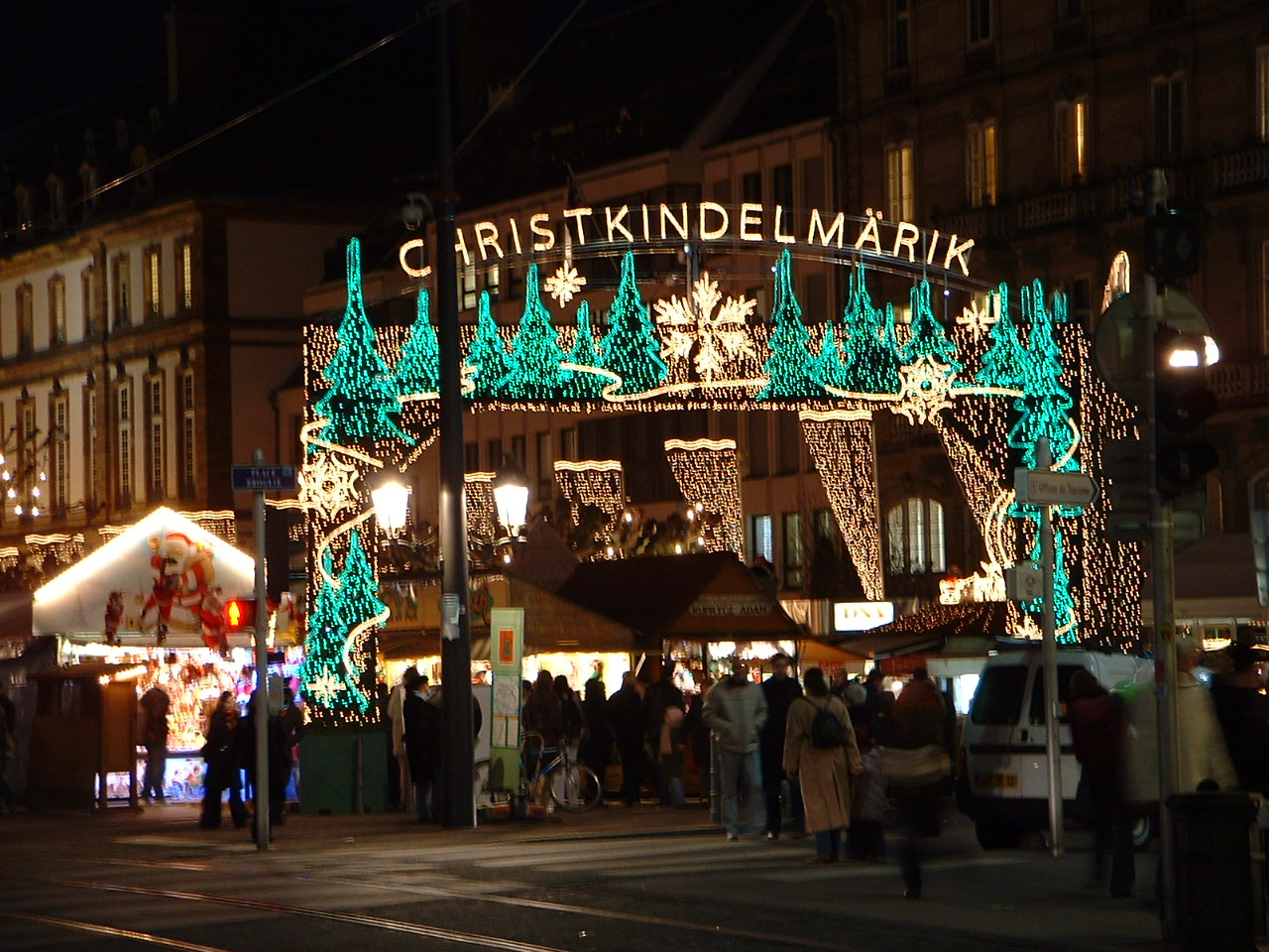 Le traditionnel "Christkindelmärik" de Strasbourg, ou "marché de l'enfant Jésus".